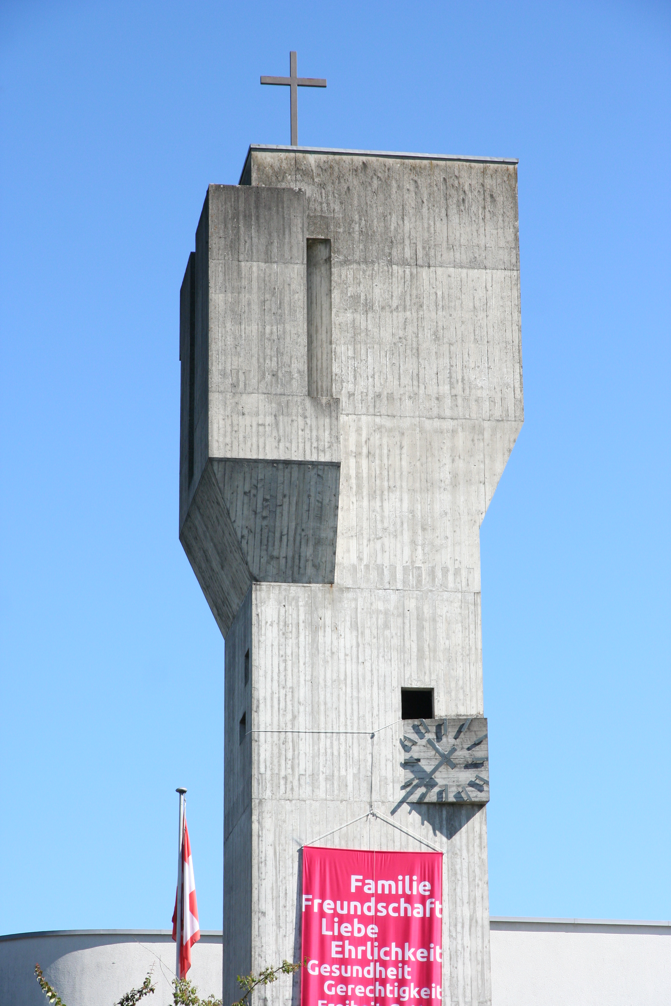 Römisch-katholische Pfarrkirche St. Antonius Münchwilen TG